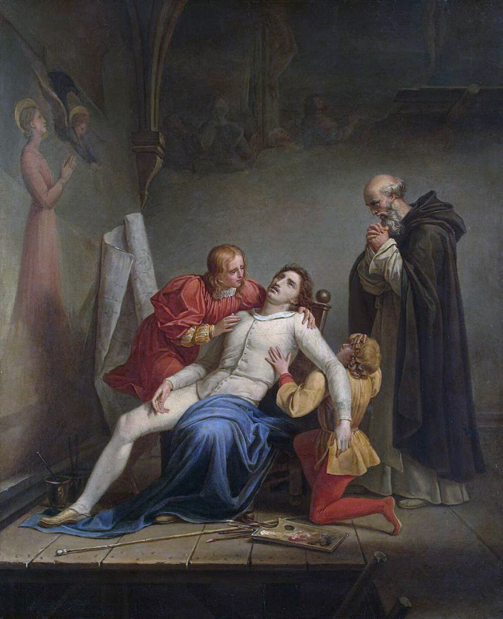 Réplique de l'œuvre située au musée de Grenoble